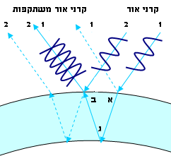 דיאגרמה מס. 3 מהערך בועת סבון בוויקיפדייה האנגלית, שתורגמה עבור הערך המקביל בעברית.